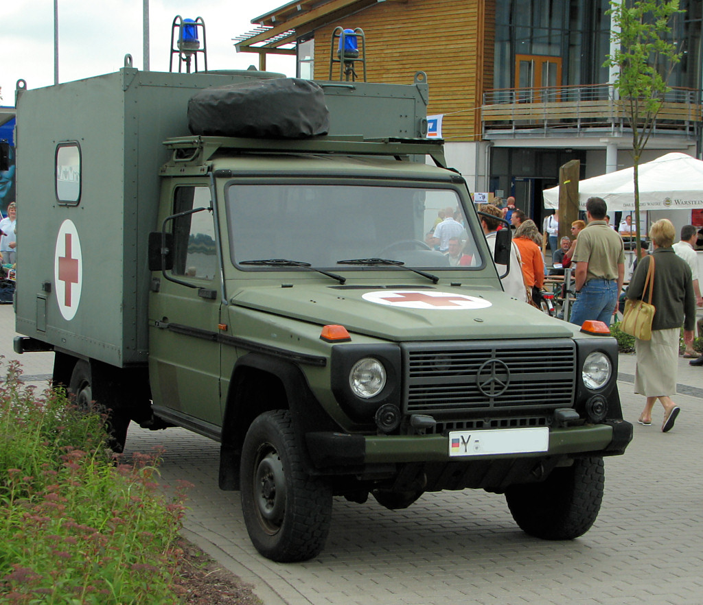 Dieses Bild zeigt einen MB 250 GD lang mit Einbausatz Sanität.